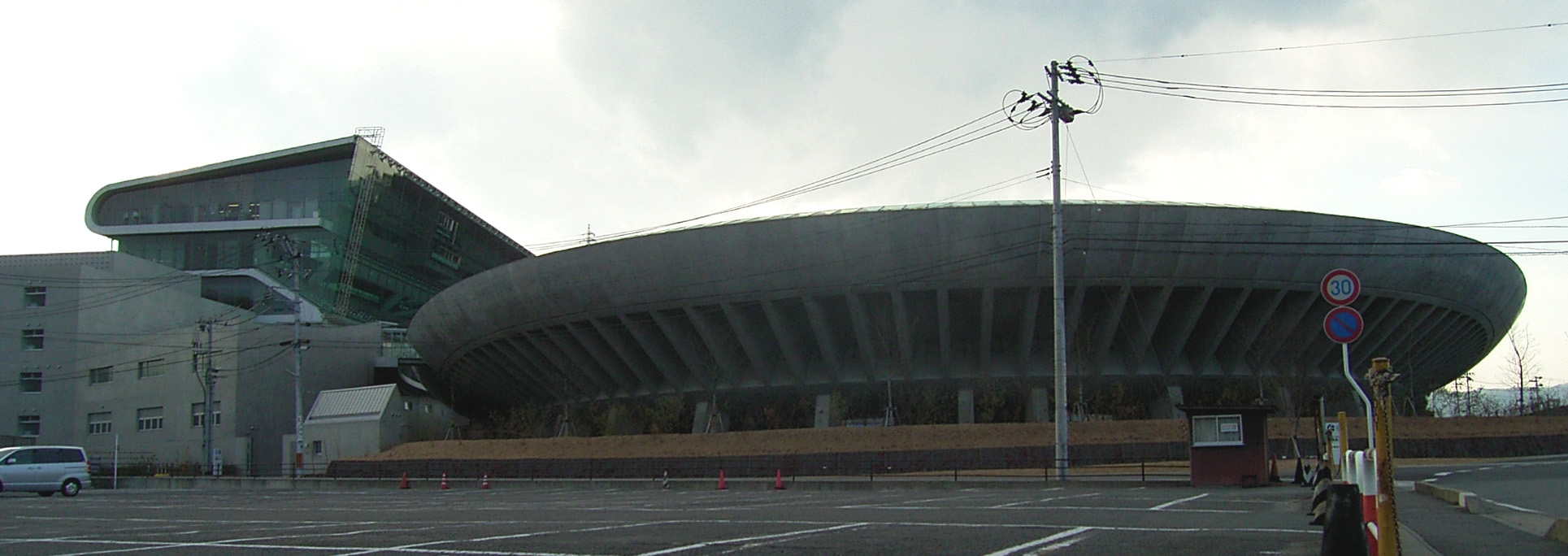 IwakiCity iwaki Tairakeirin いわき市 いわき平競輪場の外観